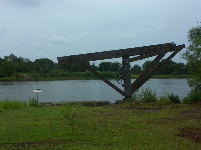 Gammal kran vid Fiskeby bruk i Norrköping. "Fiskeby järnväg"